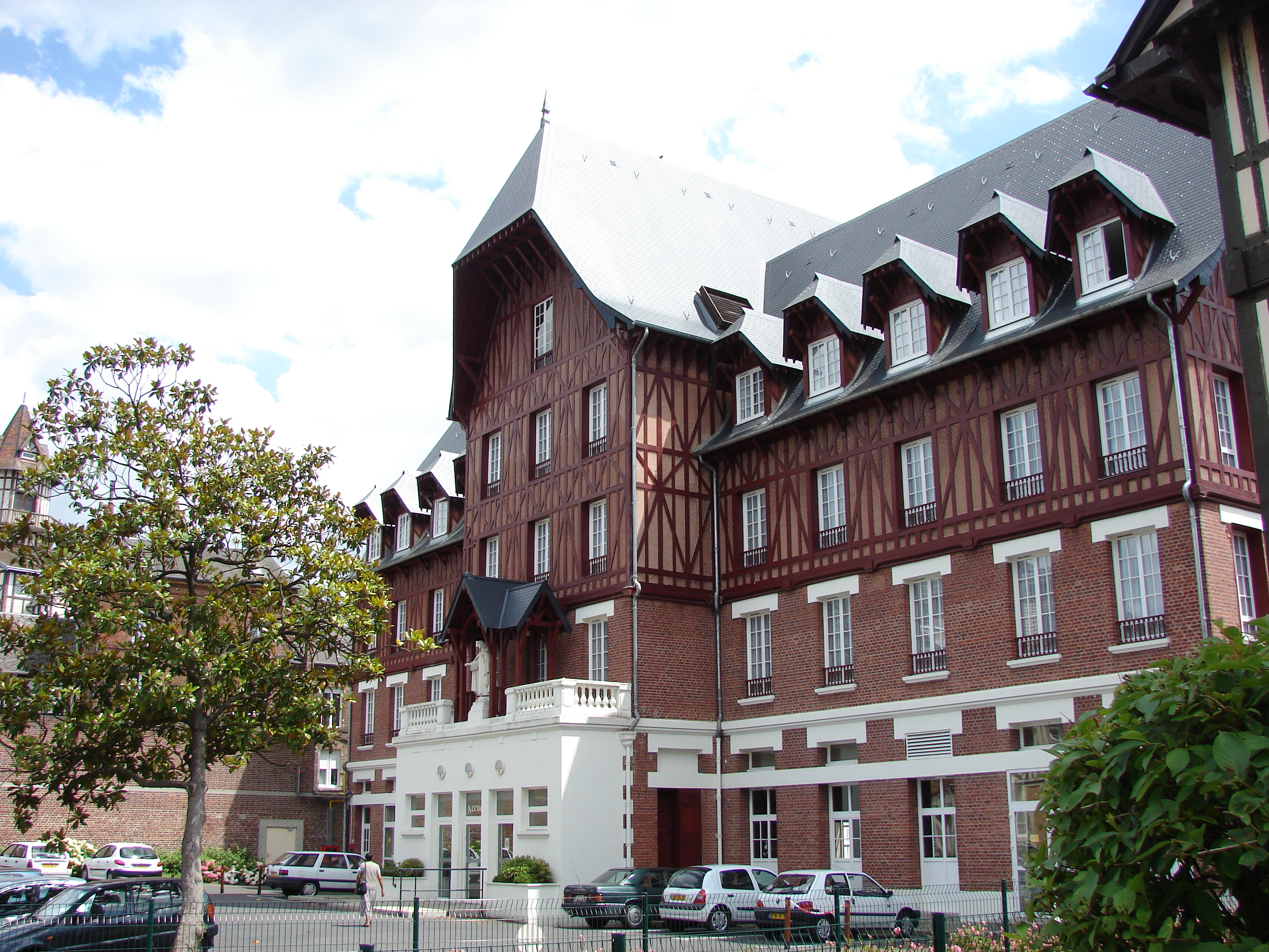 Lisieux, Lower Normandy, France